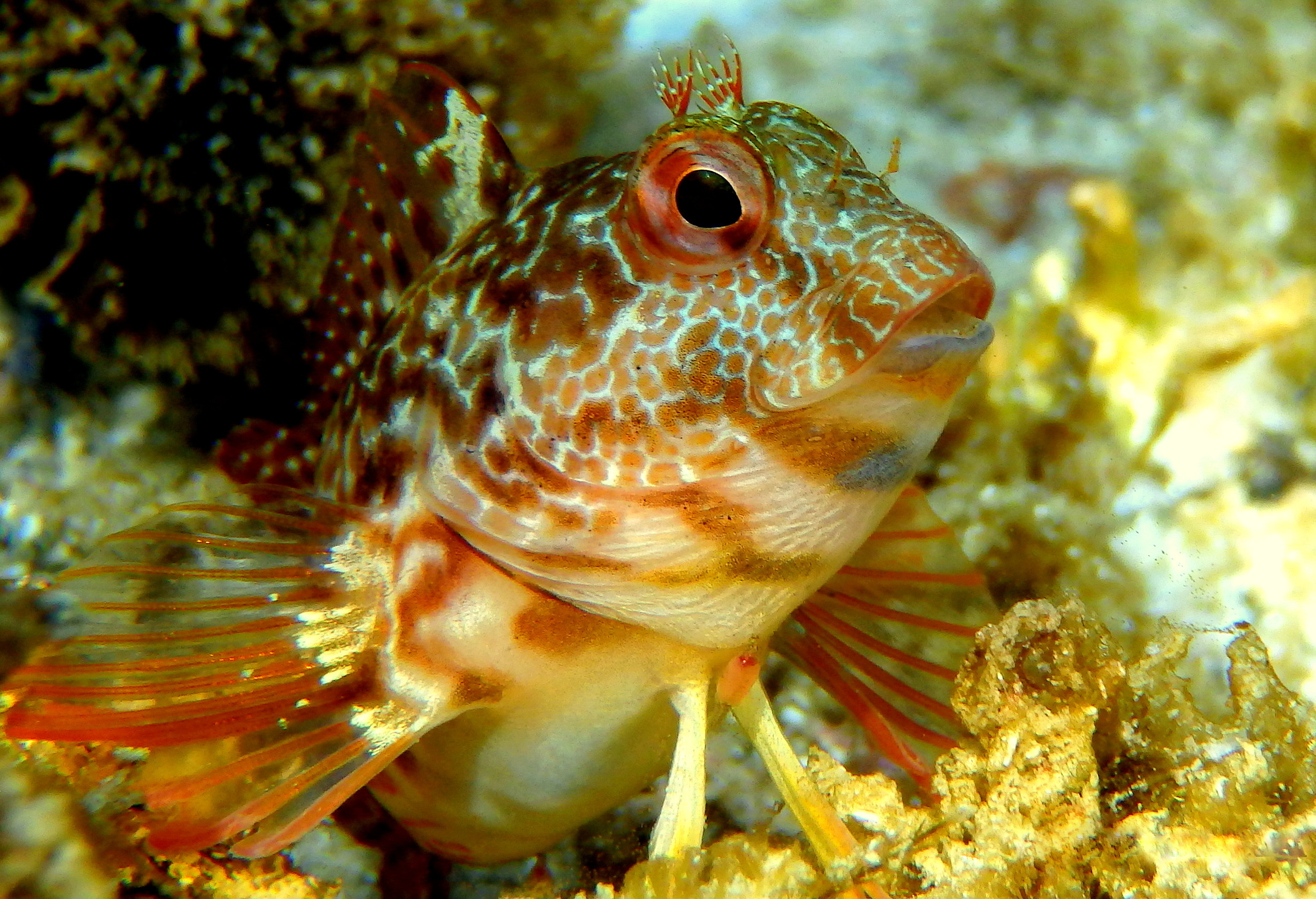 Parque natural del Estrecho This is a photography of a Site of Community Importance in Spain with the ID: ES0000337. Natura2000 entry, EEA entry